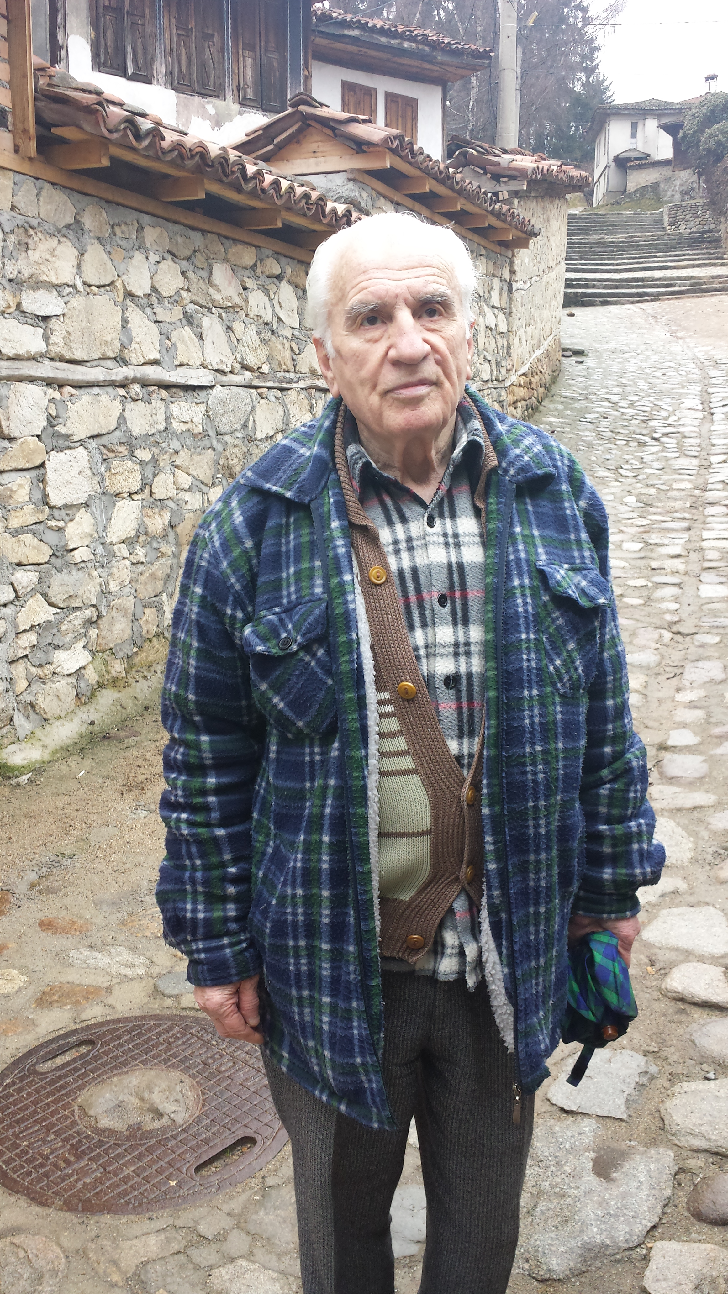 Добрин Иванов - Бинчо 2015